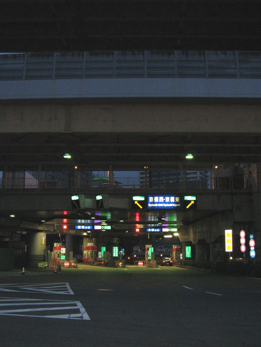 阪神高速道路京橋出入口